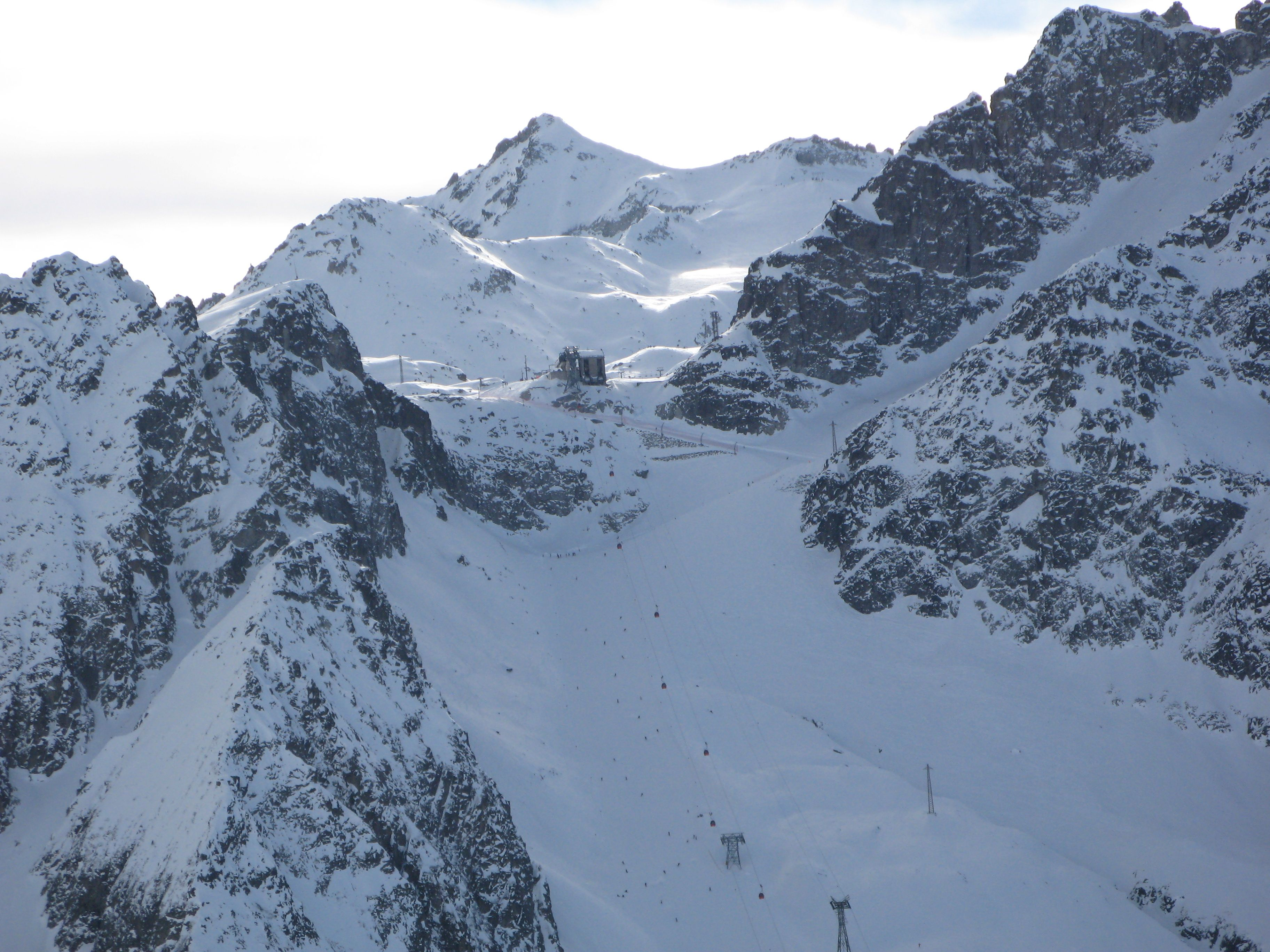 Cima Presena 3069m